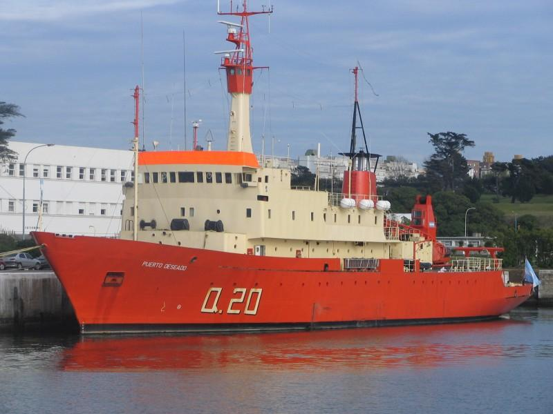 Buque Oceanográfico Q-20 ARA Puerto Deseado Martín Otero Base Naval Mar del Plata 09-2005